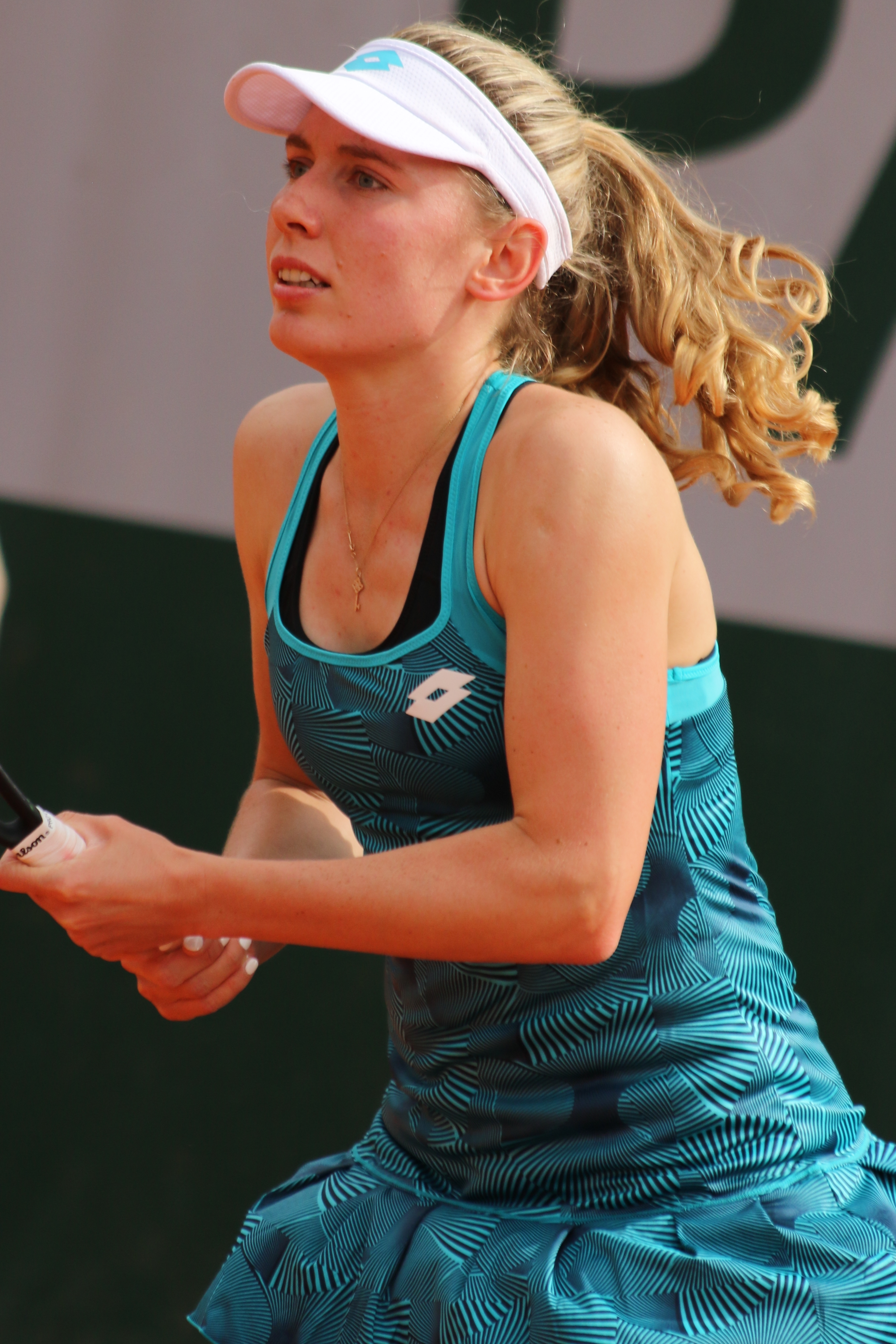 Alexandrova RG19 (24)